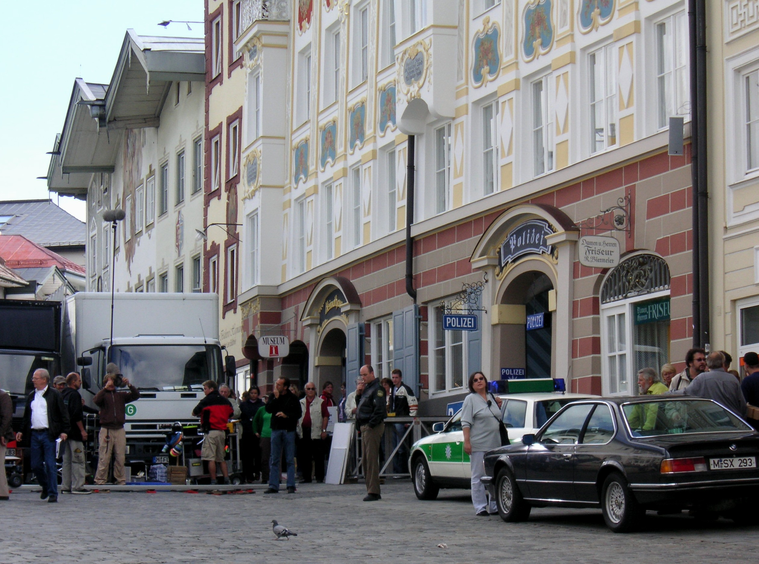 Dreharbeiten für der "Bulle von Tölz" auf der Marktstrasse in Bad Tölz, September 2006